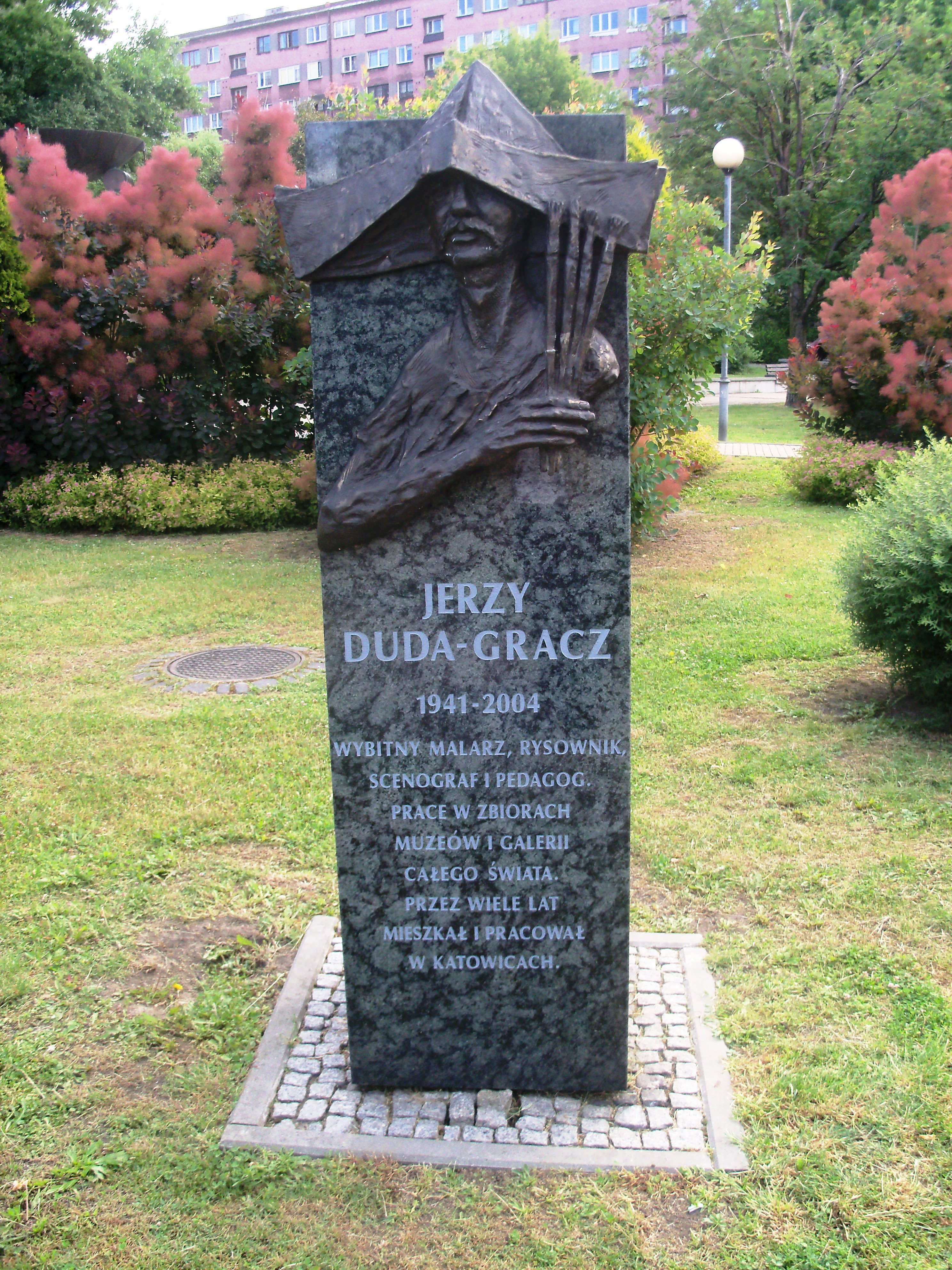 Galeria Artystyczna na placu Grunwaldzkim w Katowicach: Rzeźba przedstawiająca Jerzego Dudę-Gracza